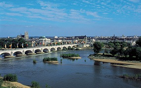 Le Pont Wilson à Tours